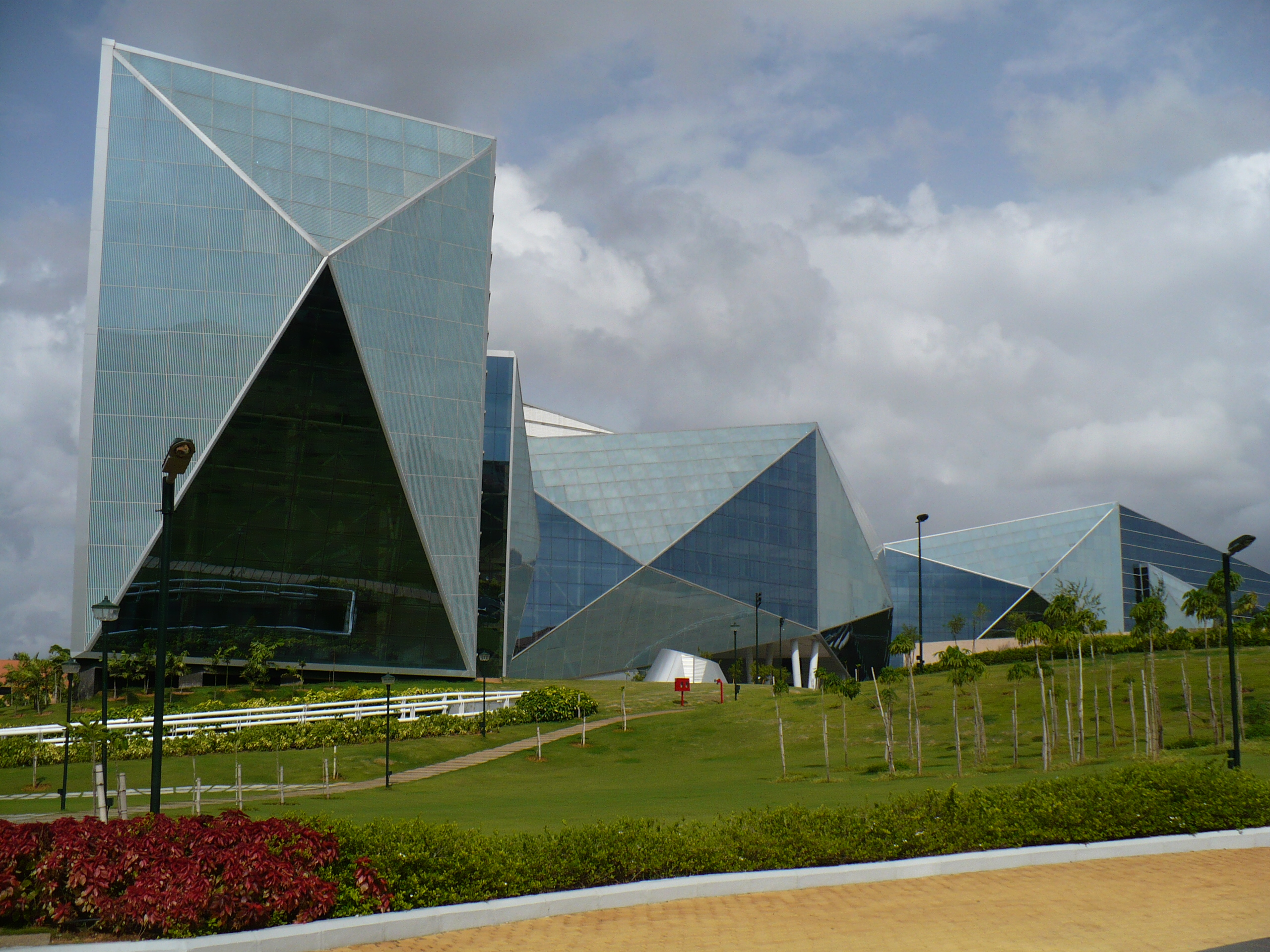 By Nikhil Kulkarni